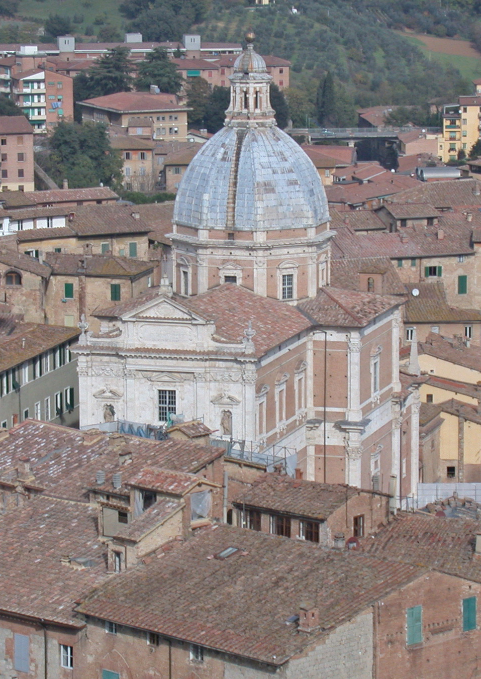 Italia, Siena, Chiesa con cupola di... dalla Torre del Mangia